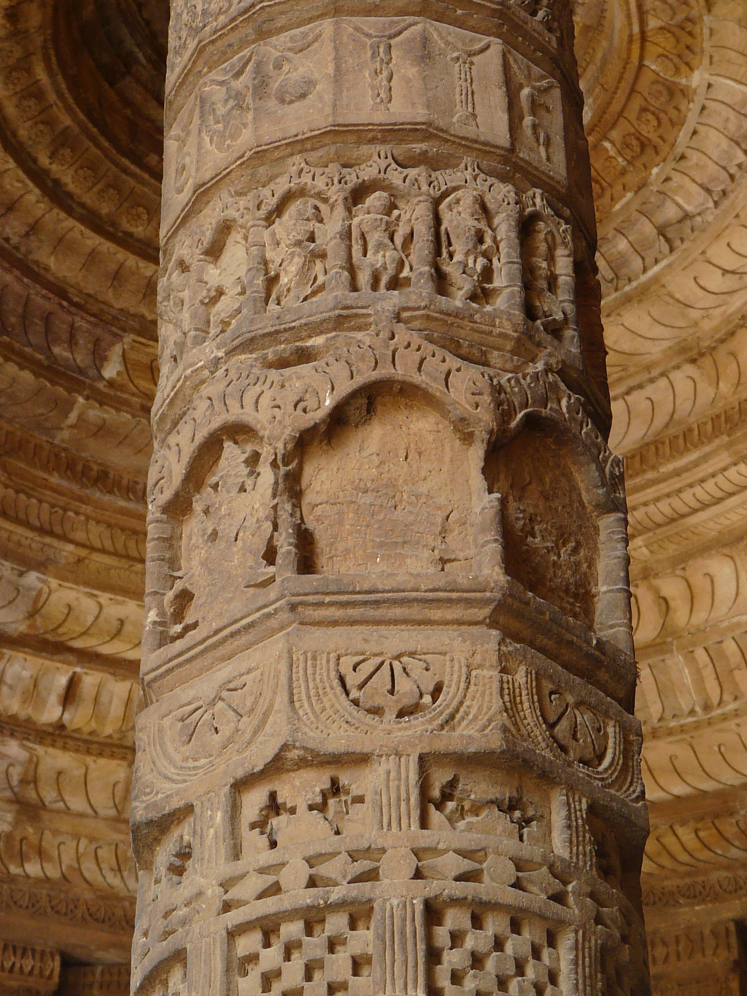 Column detail Adhai Din-ka-Jhonpra, Ajmer, Rajasthan, India